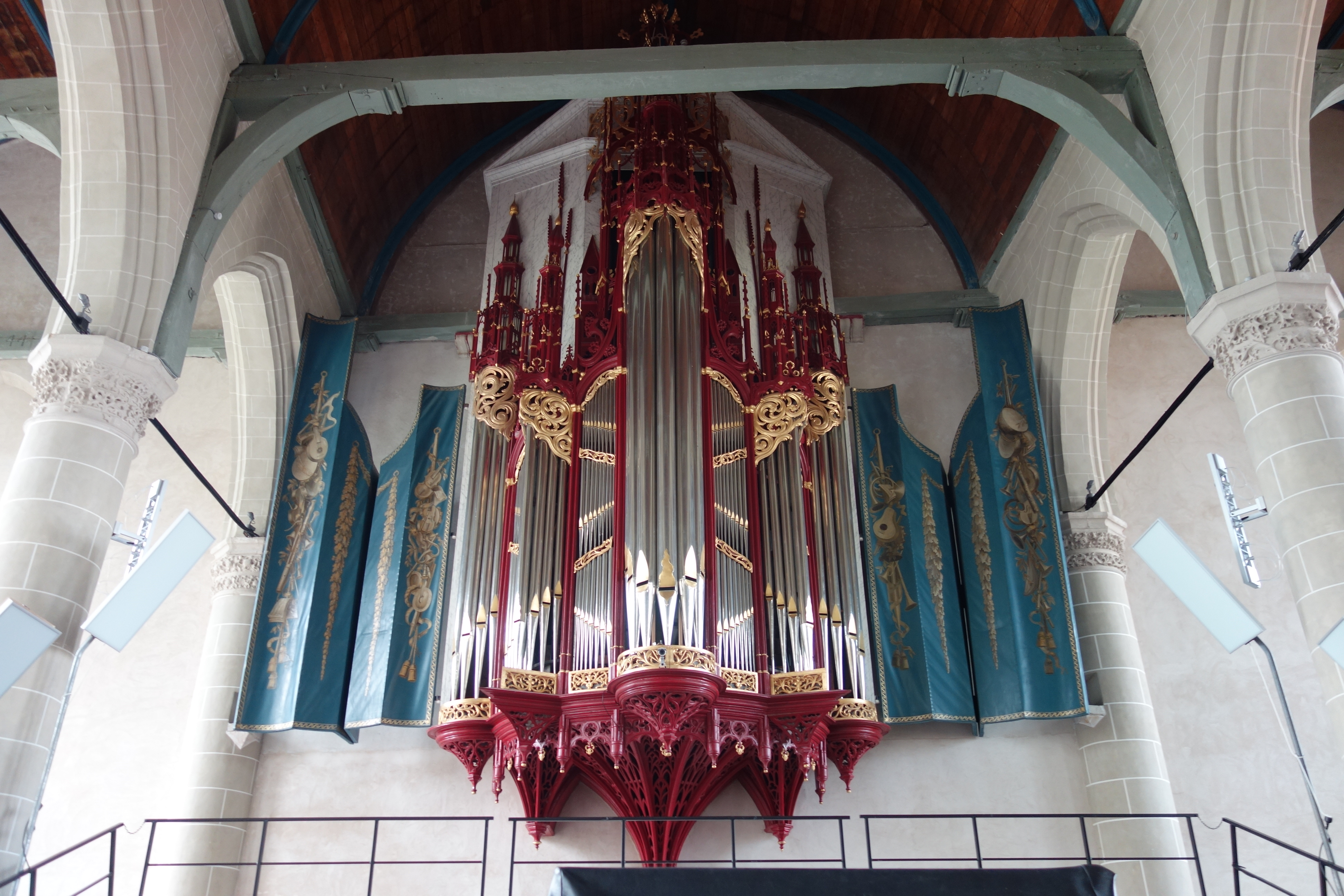 Het orgel is ontworpen door Daniël Stoopendaal, Willem Slodt heeft aan de luiken gewerkt en het snijwerk is van Arie Grootendorst. Het orgel is gebouwd, onder andere uit ouder pijpwerk, door Johann Michael Gerstenhauer.